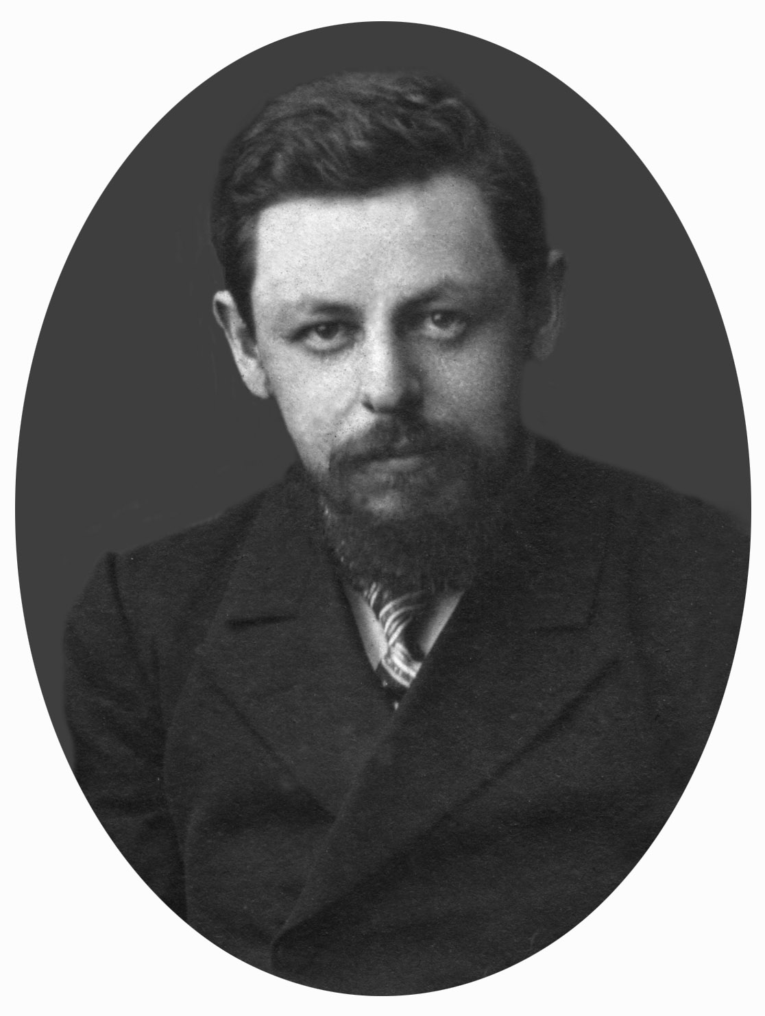 Фотопортрет Е. В. Тарле с группового снимка выпуска Курсов Лесгафта 1903 года